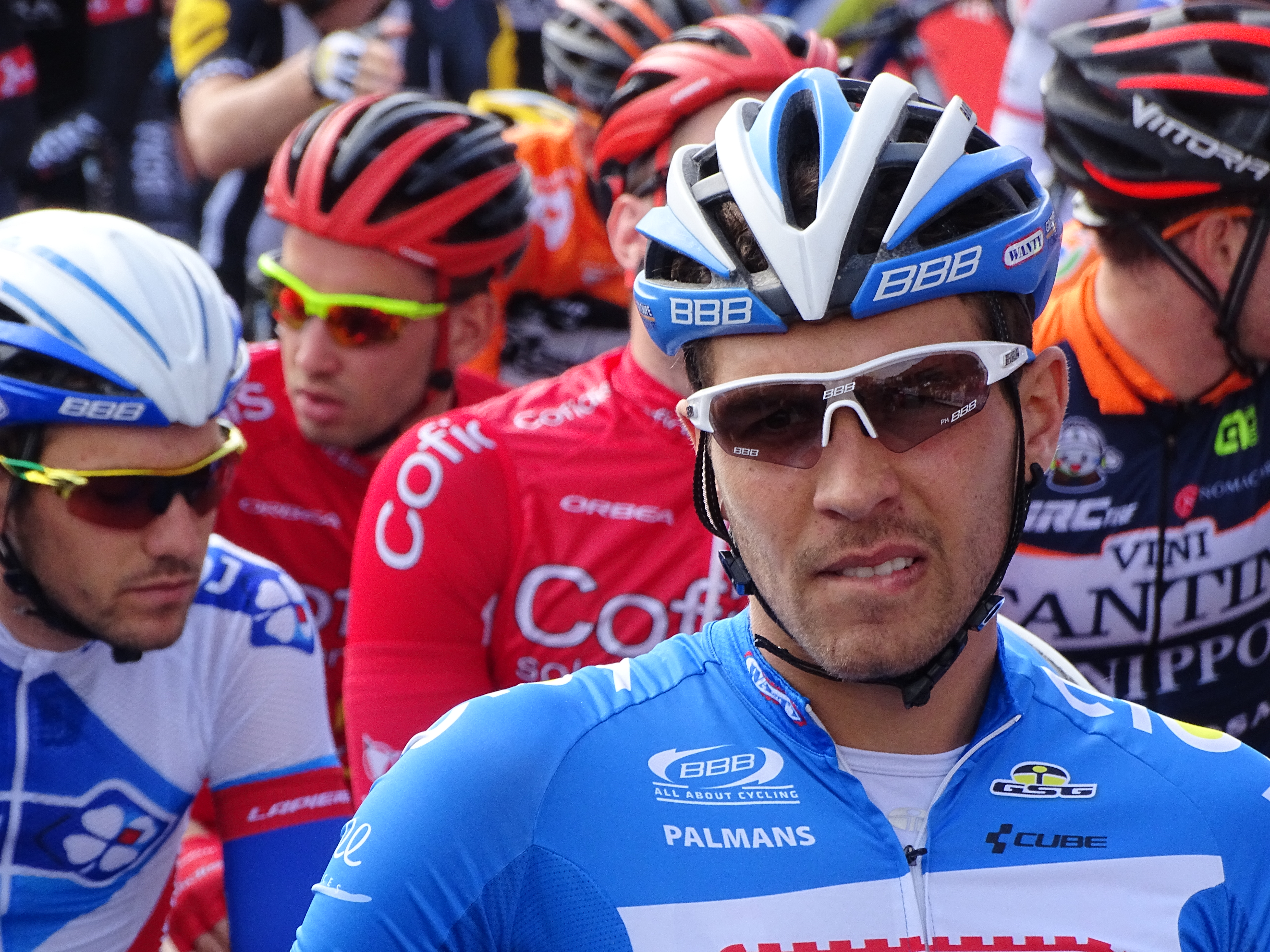 Reportage réalisé le mercredi 8 avril à l'occasion du départ du Grand Prix de l'Escaut 2015 à Anvers, Belgique.